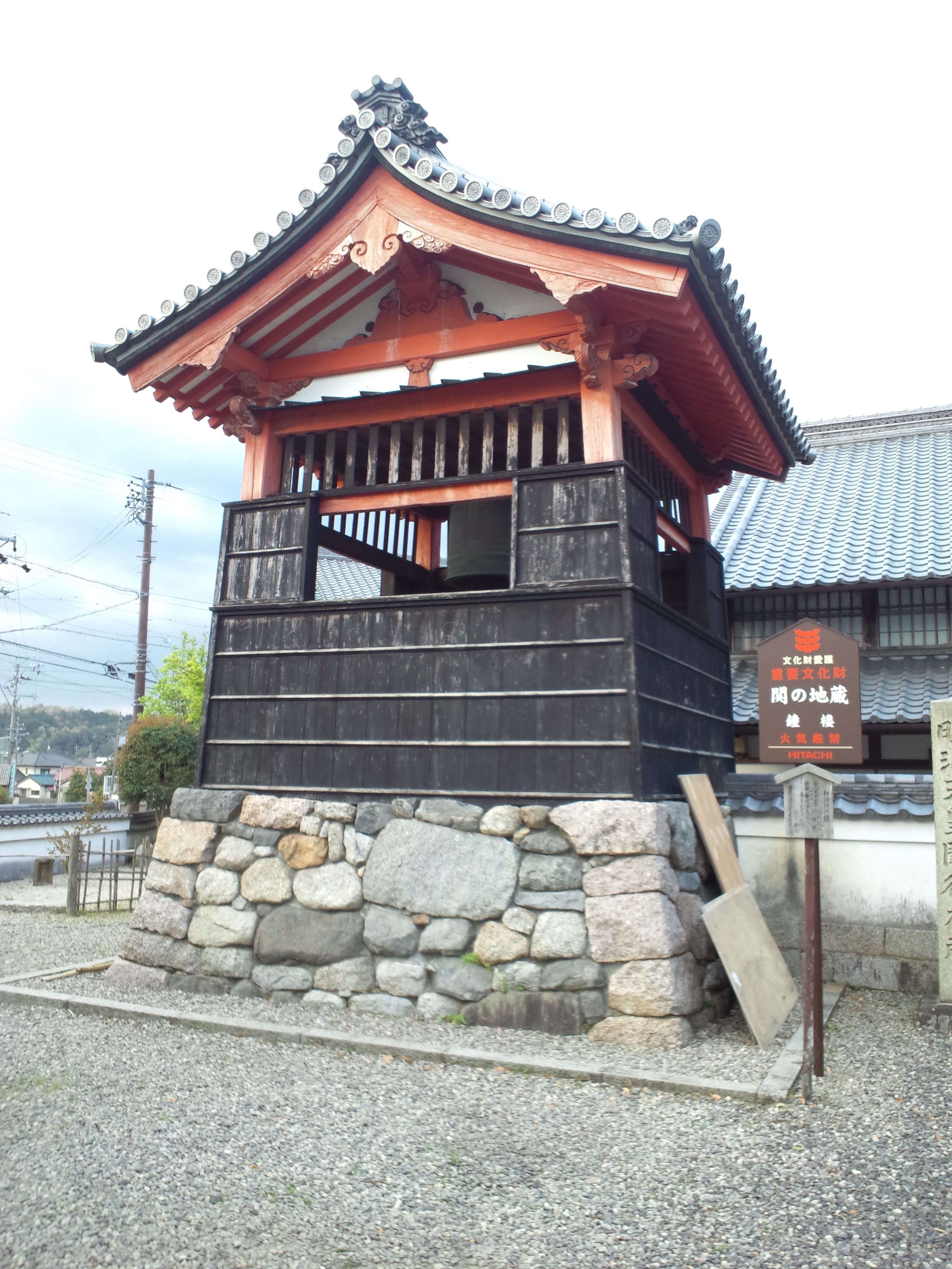 地蔵院（関の地蔵） 鐘楼